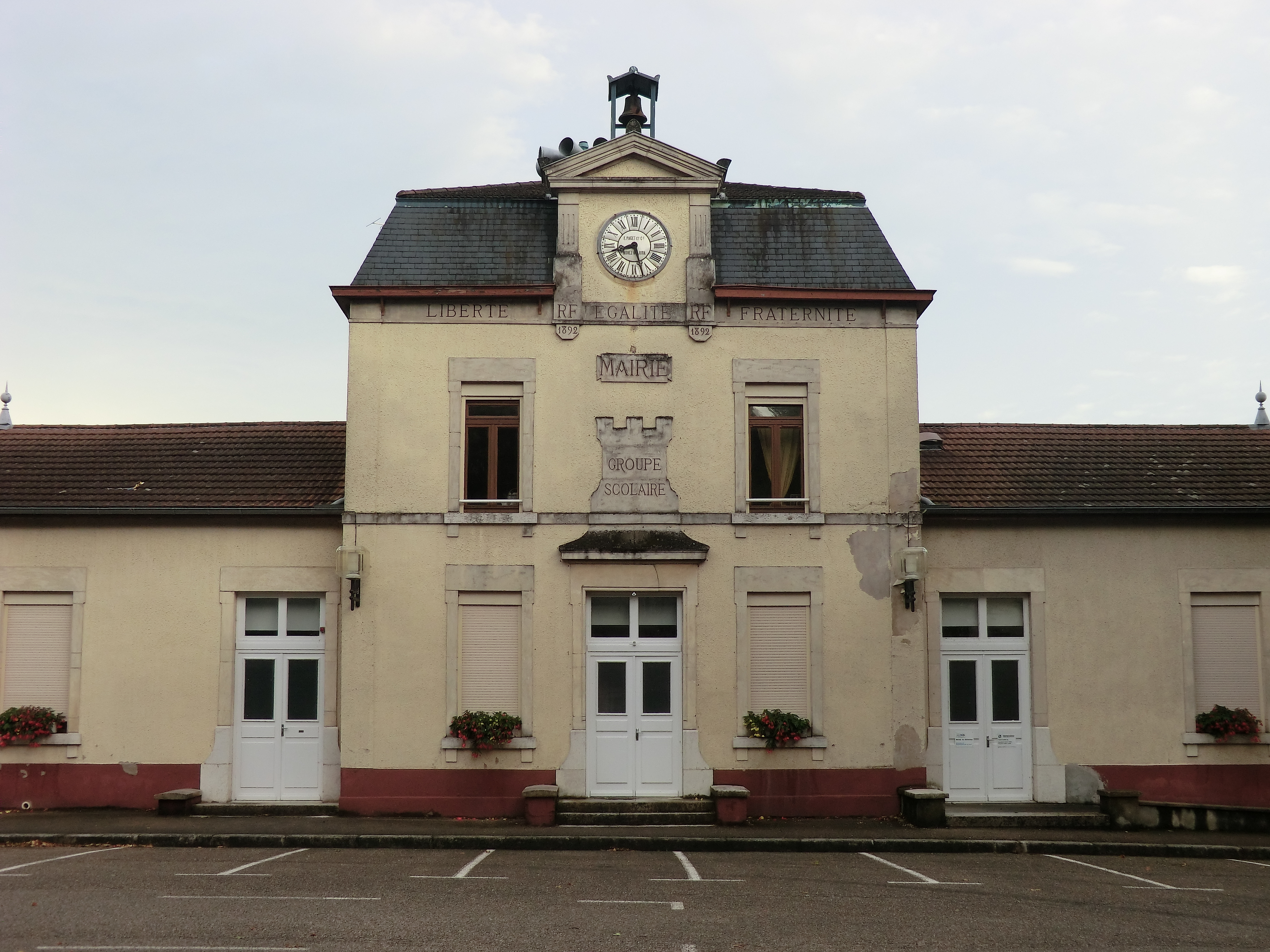 Ancienne maire-école de Bourg-Saint-Christophe (1892).